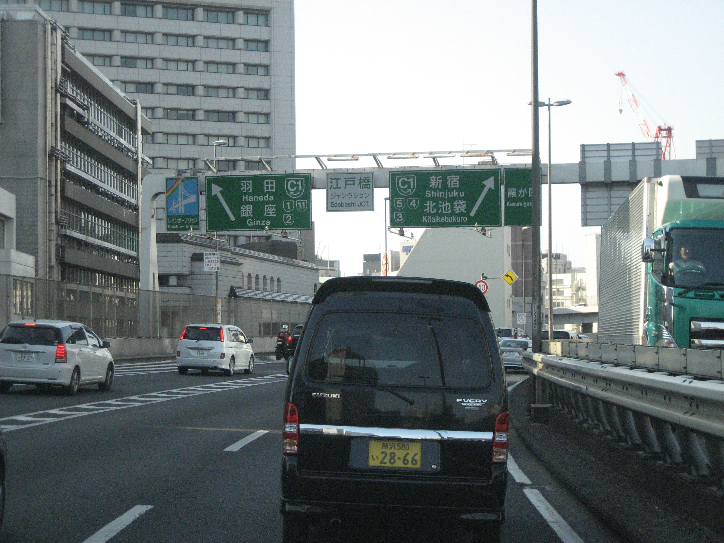 首都高速江戸橋ジャンクション